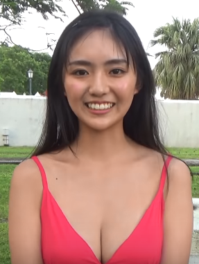 豊田ルナです。